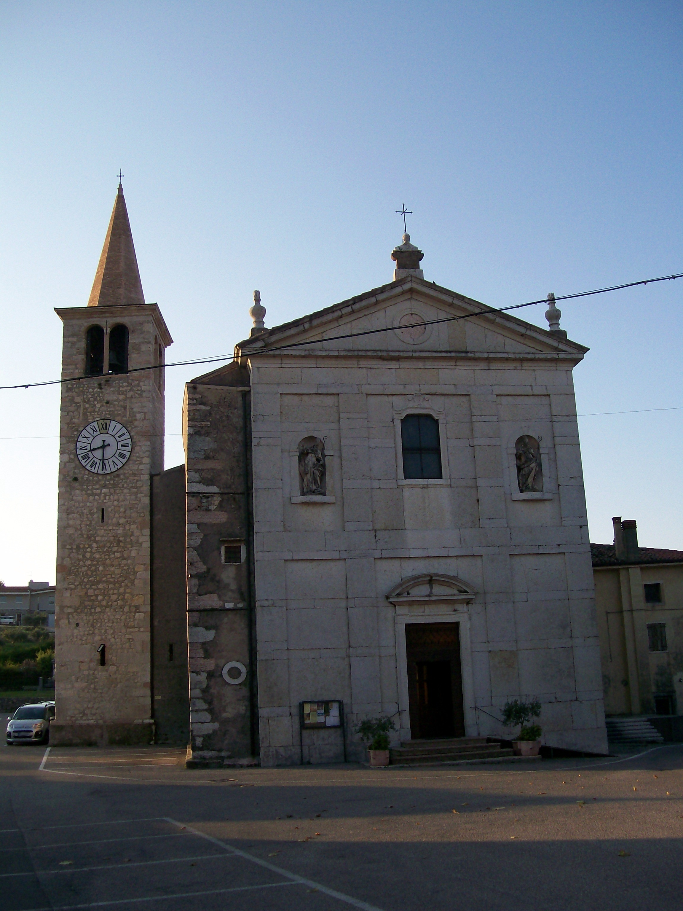 Facciata della chiesa parrocchiale di Sant'Ulderico in Castagnè (Comune di Mezzane di Sotto - VR).